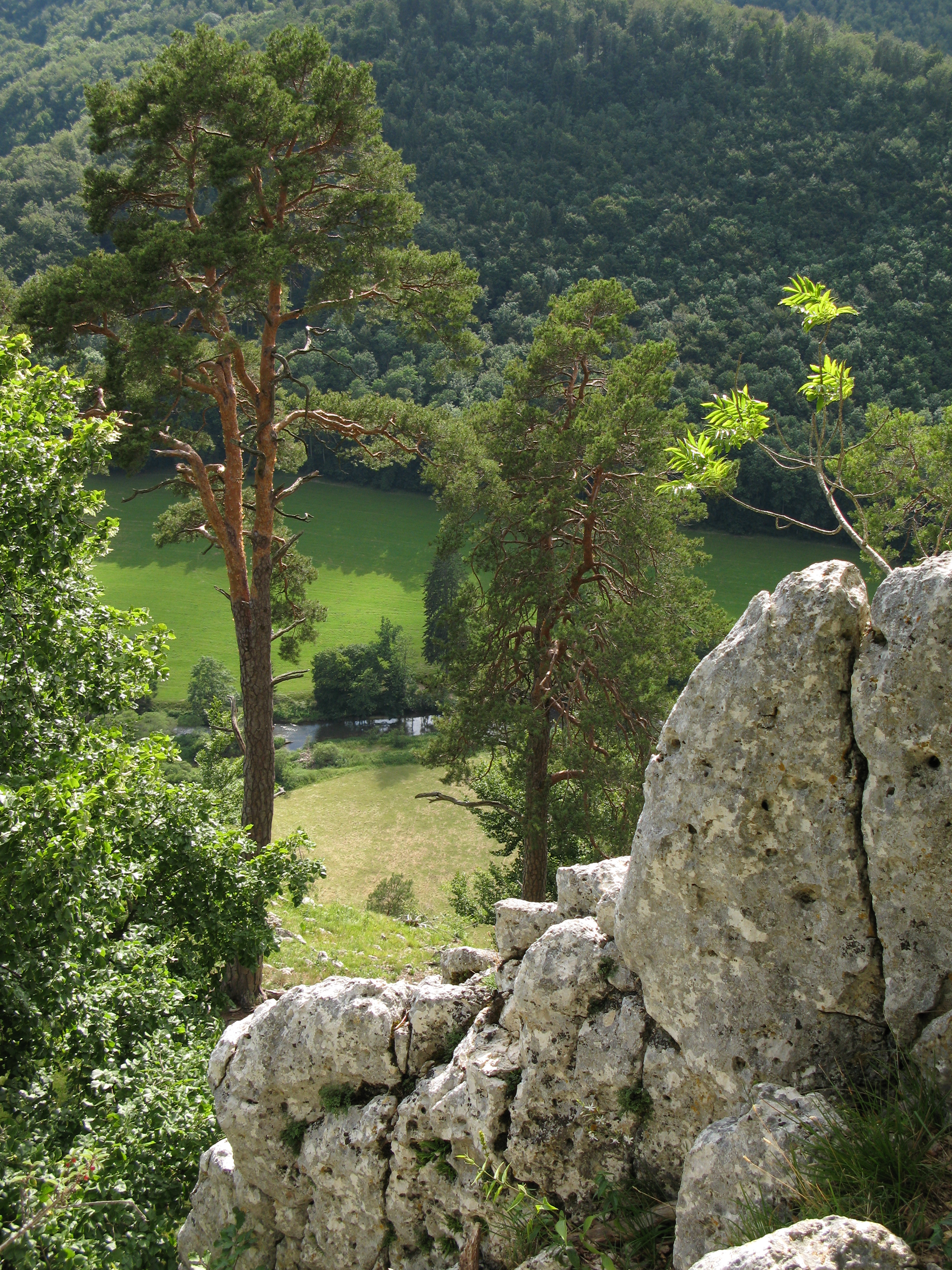 Die Donau im Donaudurchbruch in der Nähe Schloss Bronnen am Donauberglandweg auf der Schwäbischen Alb.